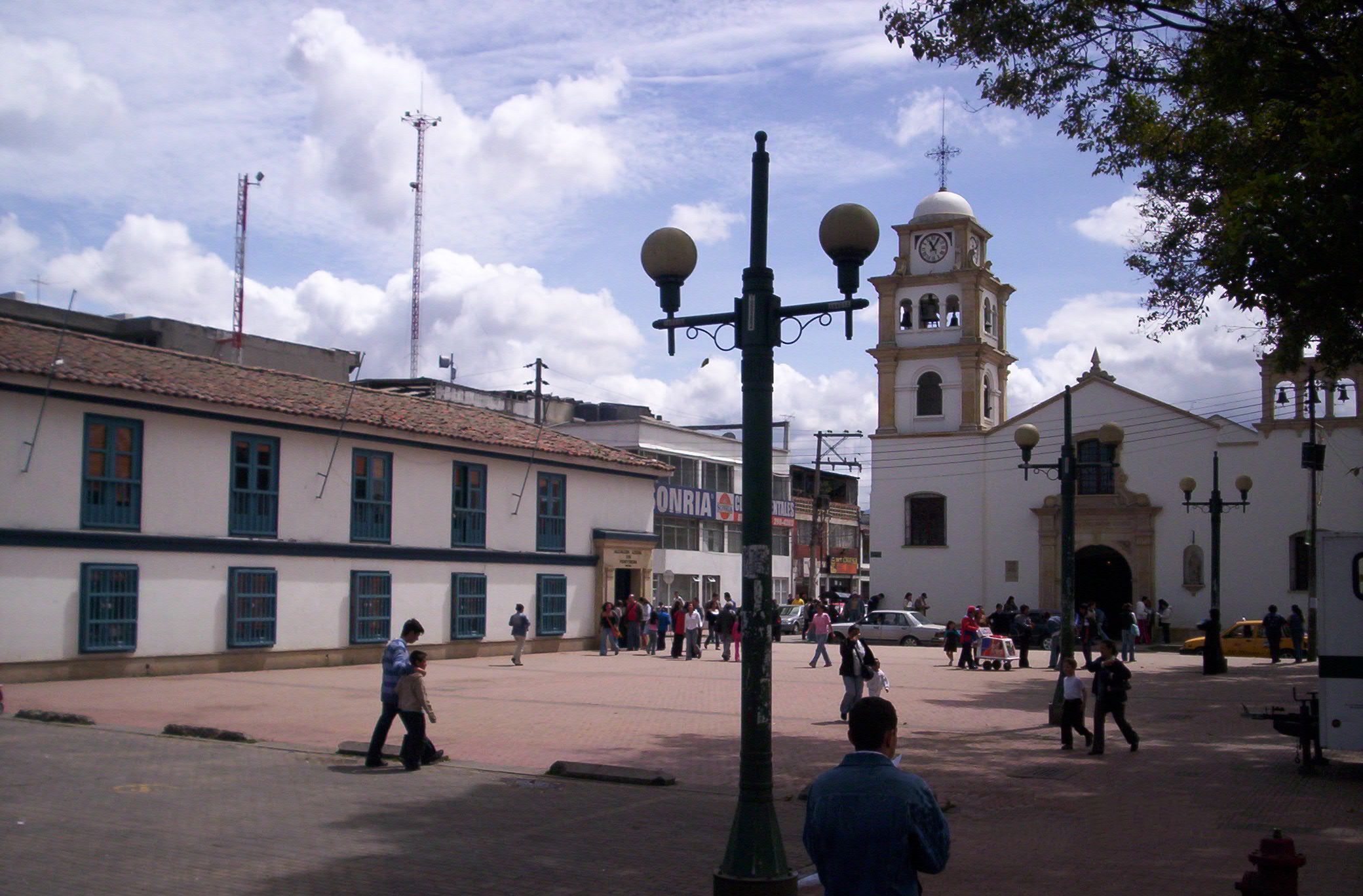 Plaza fundacional de Fontibón, Bogotá, Colombia